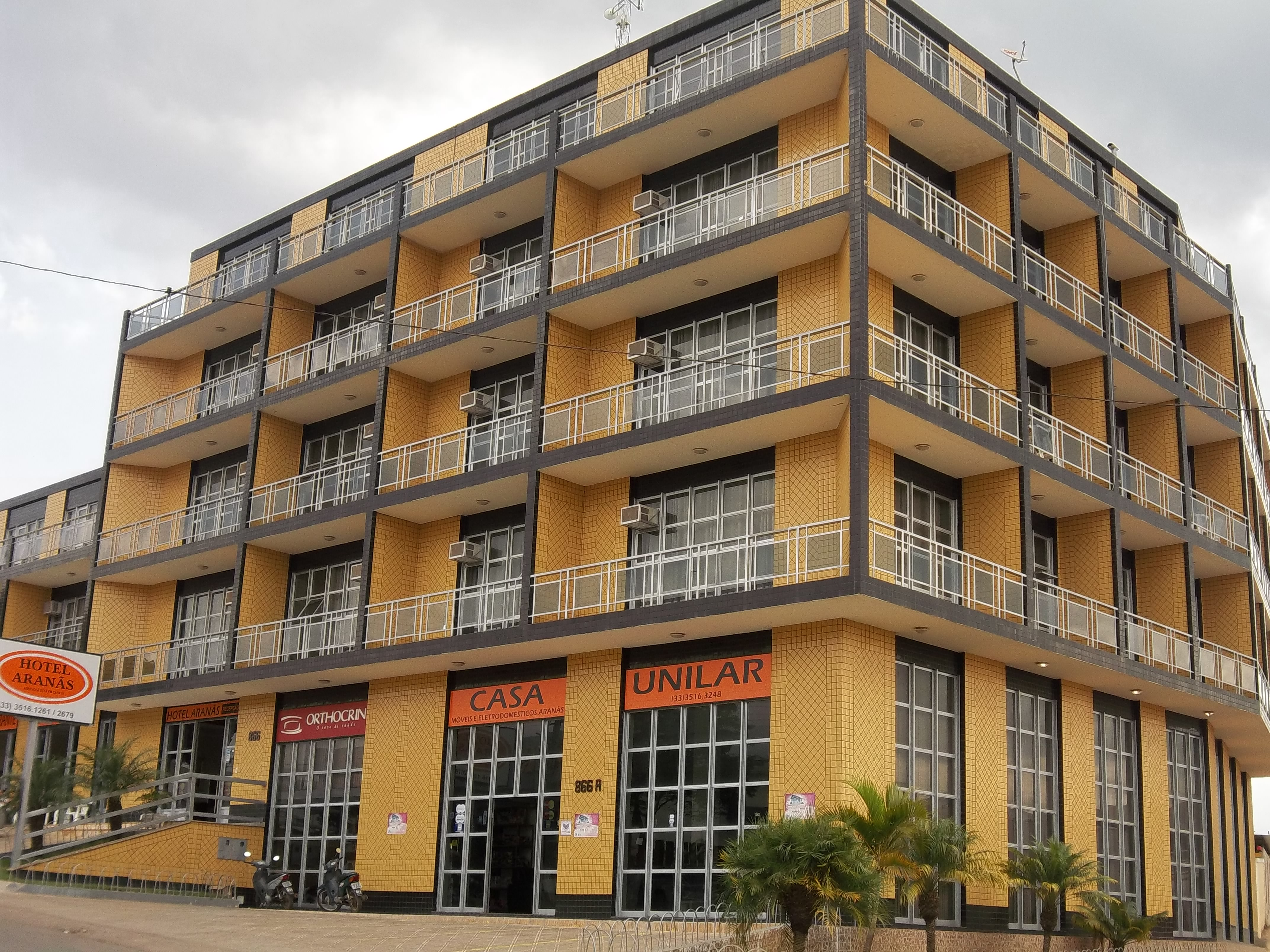 Hotel Aranãs localizado na divisa entre o Planalto e o Centro